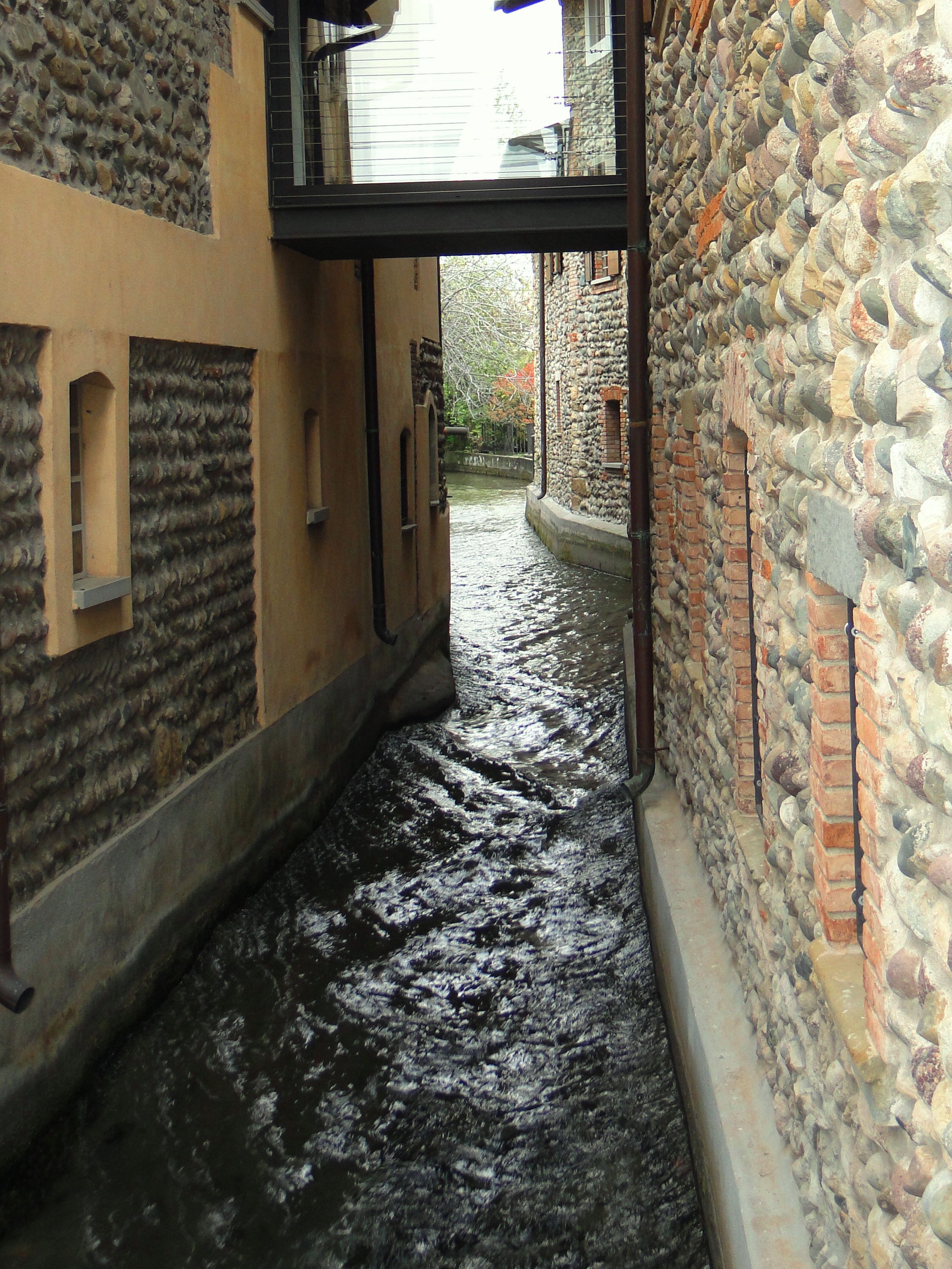 Roggia Morlana, Celadina, Bergamo